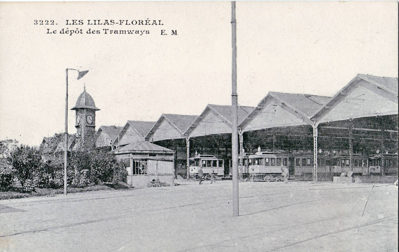 Carte postale ancienne éditée par EM, n°3222 LES LILAS-FLOREAL - Le dépôt des Tramways Il s'agit du dépôt de la Compagnie des tramways de l'Est parisien, dont on distingue les numéros de ligne sur les motrices